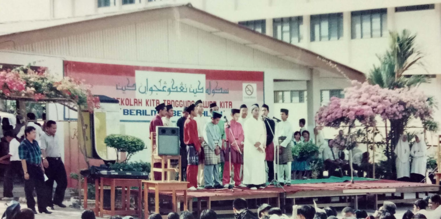 Dinding Kantin 90an